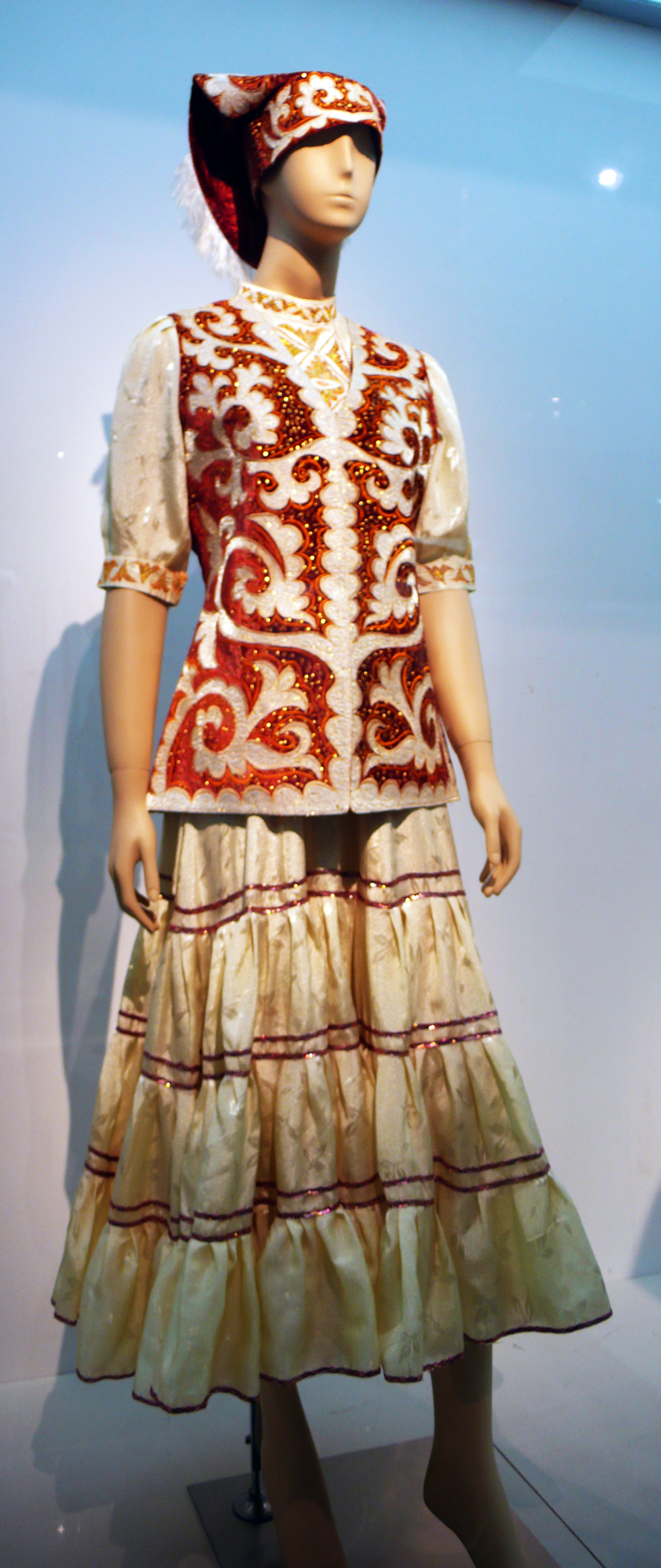 塔塔尔族贴绣花叶纹坎肩荷叶边长裙女服。民大民族博物馆藏。